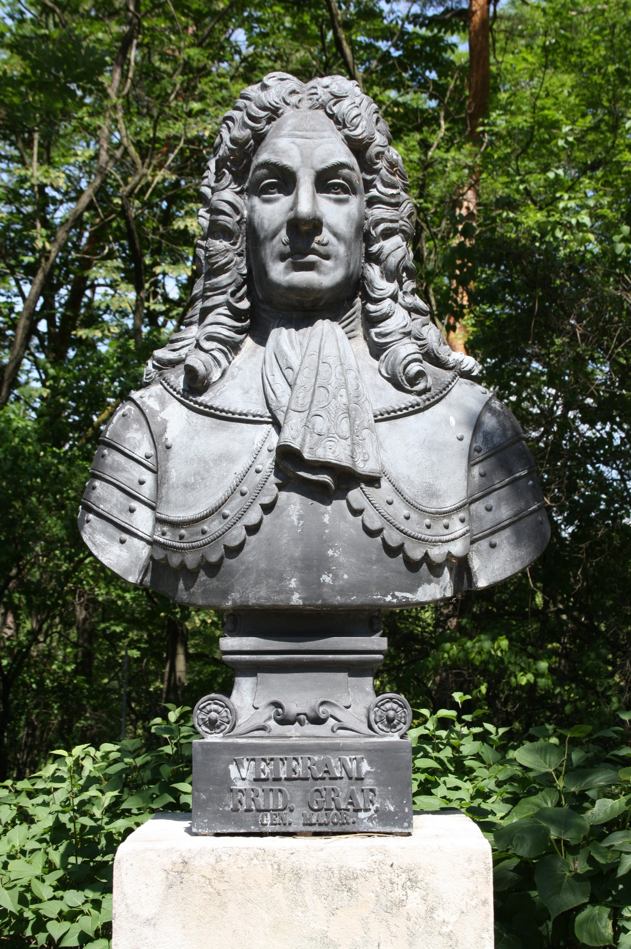 Büste in der Gedenkstätte Heldenberg (Niederösterreich)